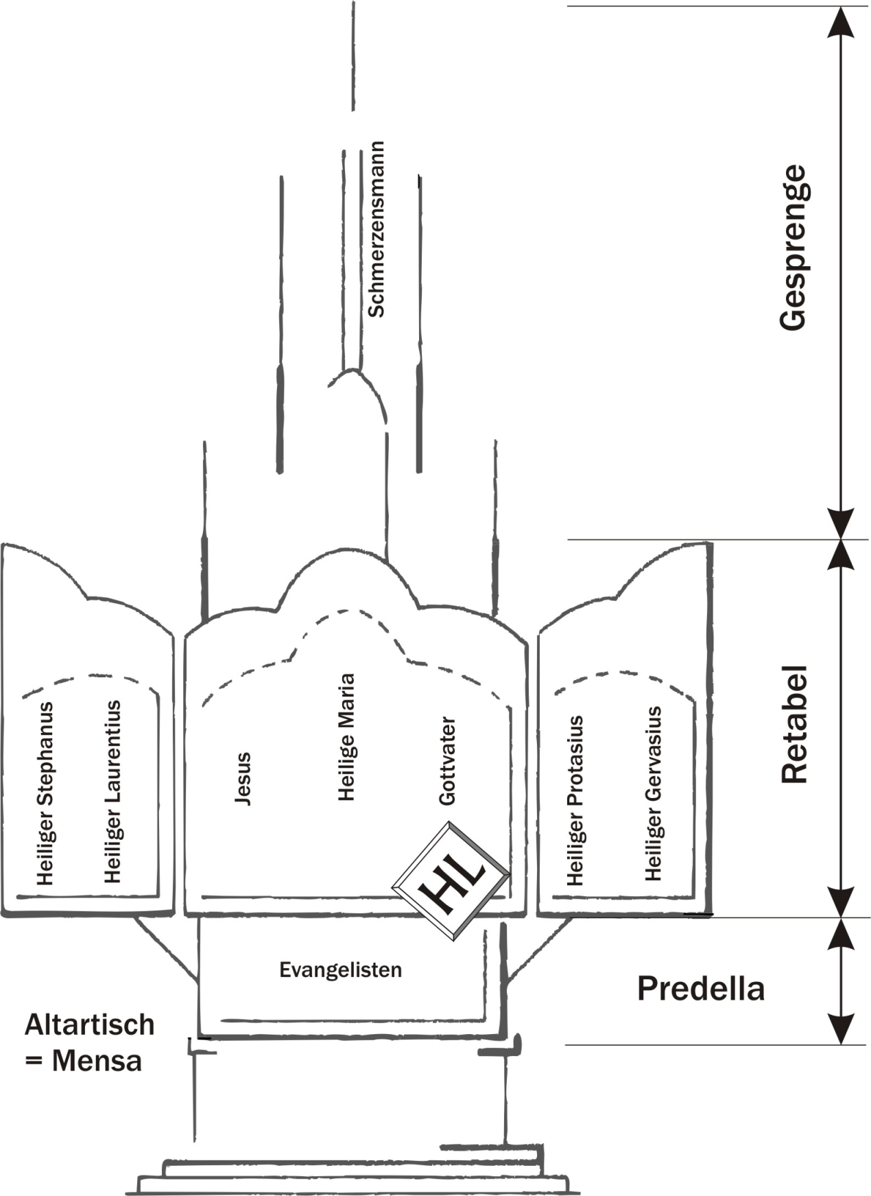 Schema des Hochaltars HL im Breisacher MÃ¼nster mit den Positonen der Figurenschnitzereien